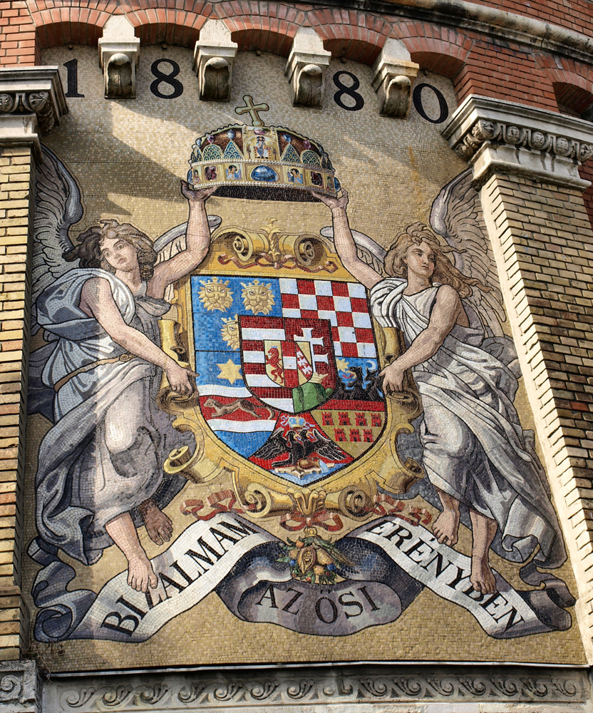 "Bizalmam az ősi erényben" – Ferenc József királyi jelmondata (Budapest, I. ker., Clark Ádám tér, az alagúttól balra, a várfalon látható)